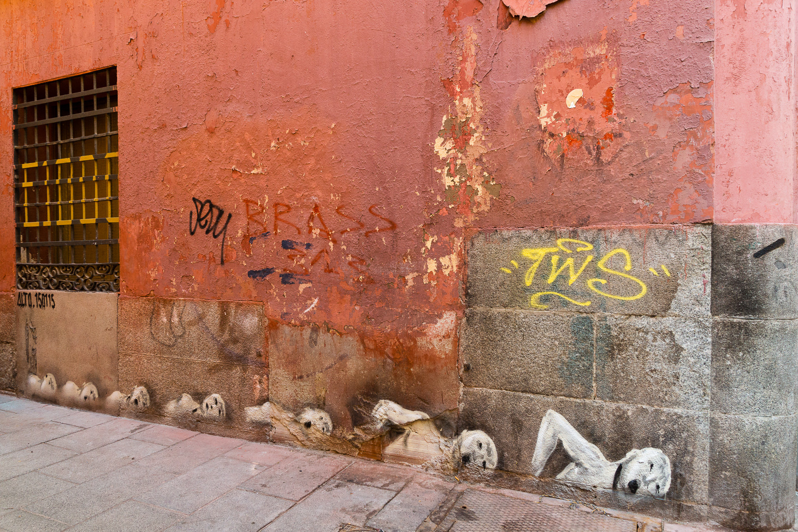 Lavapiés, Madrid, España.